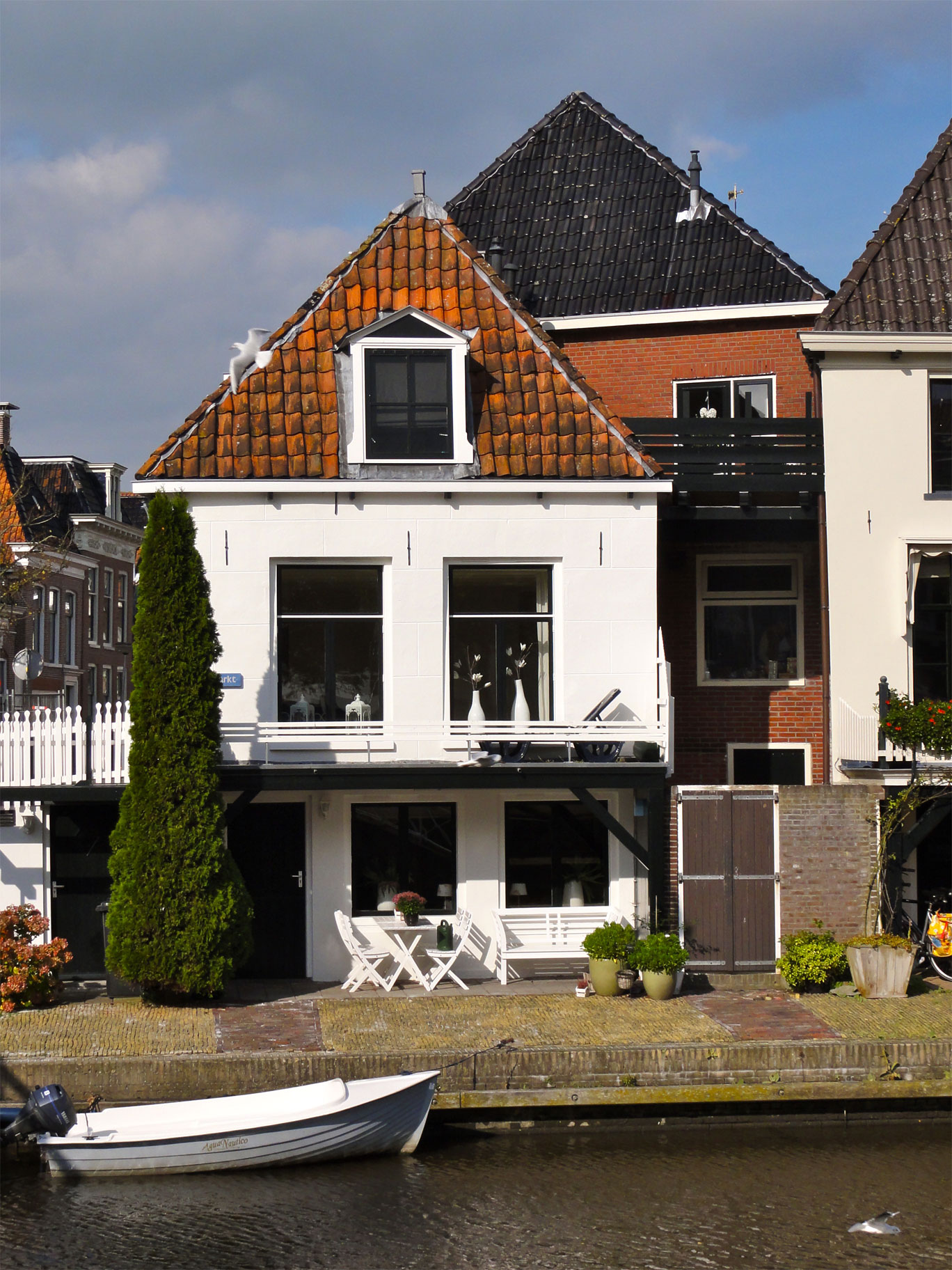 Achtergevel Nauwstraat 17 Dokkum, rijksmonument